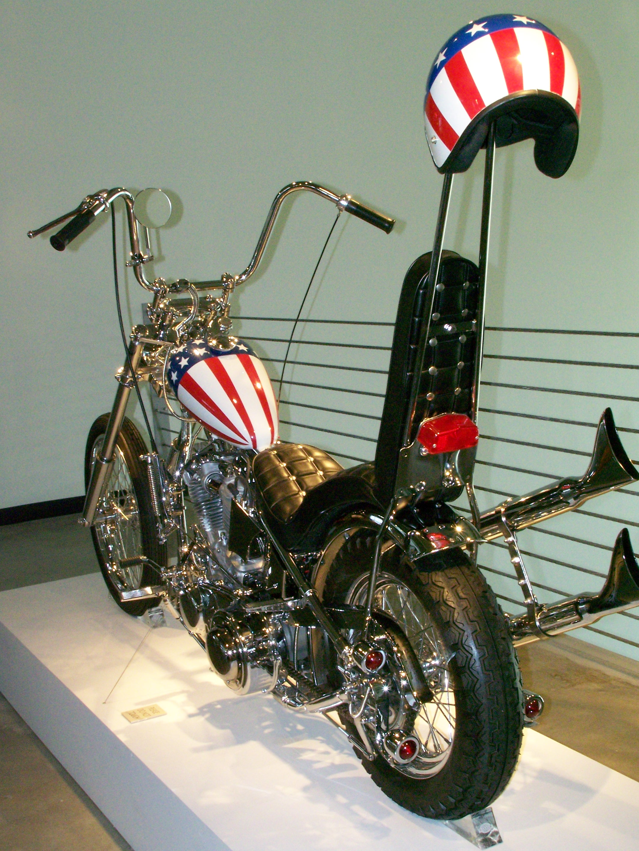 Barber Vintage Museum_364 Chopper in Easy Rider